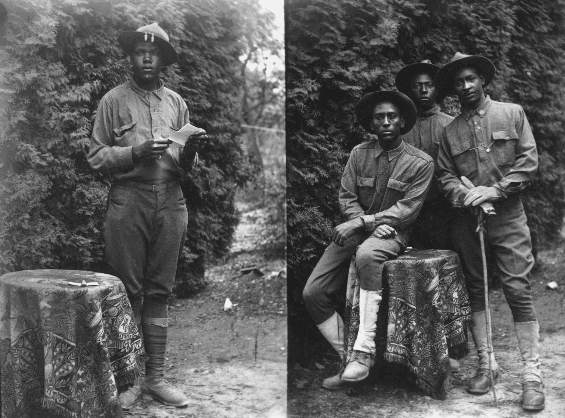 Lucien Edmond, pharmacien et photographe à Grandvillars de 1905 à 1918 a photographié durant la guerre des soldats en cantonnement dans son village. Une centaine de ces clichés concernent des soldats du 370th Infantery Regiment (régiment de la 29e Division d’Infanterie américaine en provenance de la région de Chicago). Fonds Lucien Edmond, cote 14 Fi. Archives départementales du Territoire-de-Belfort.